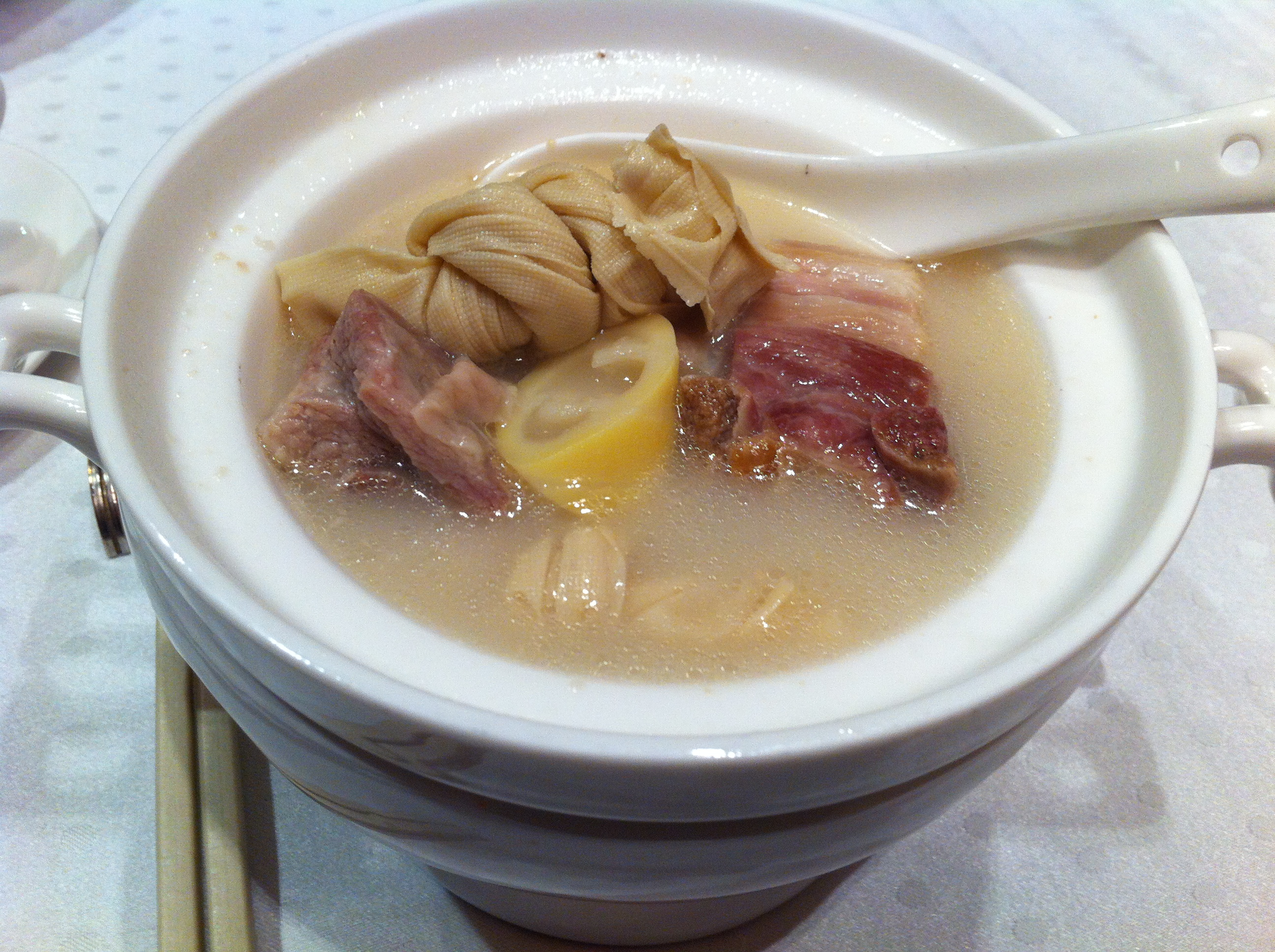 腌笃鲜